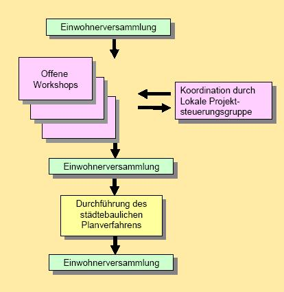 Schema des politischen Planungsprozesses des Shared Space in Bohmte